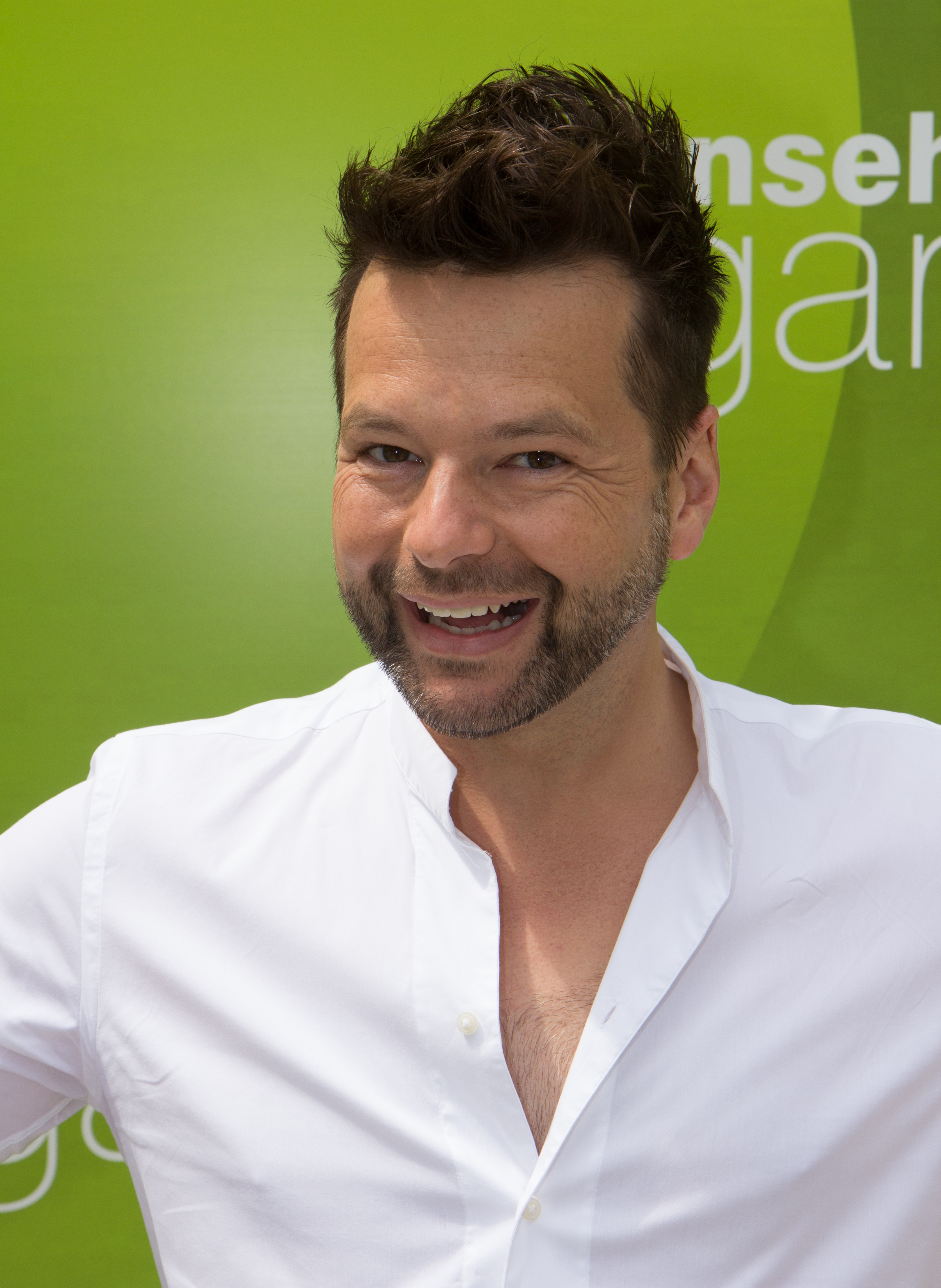 Micar